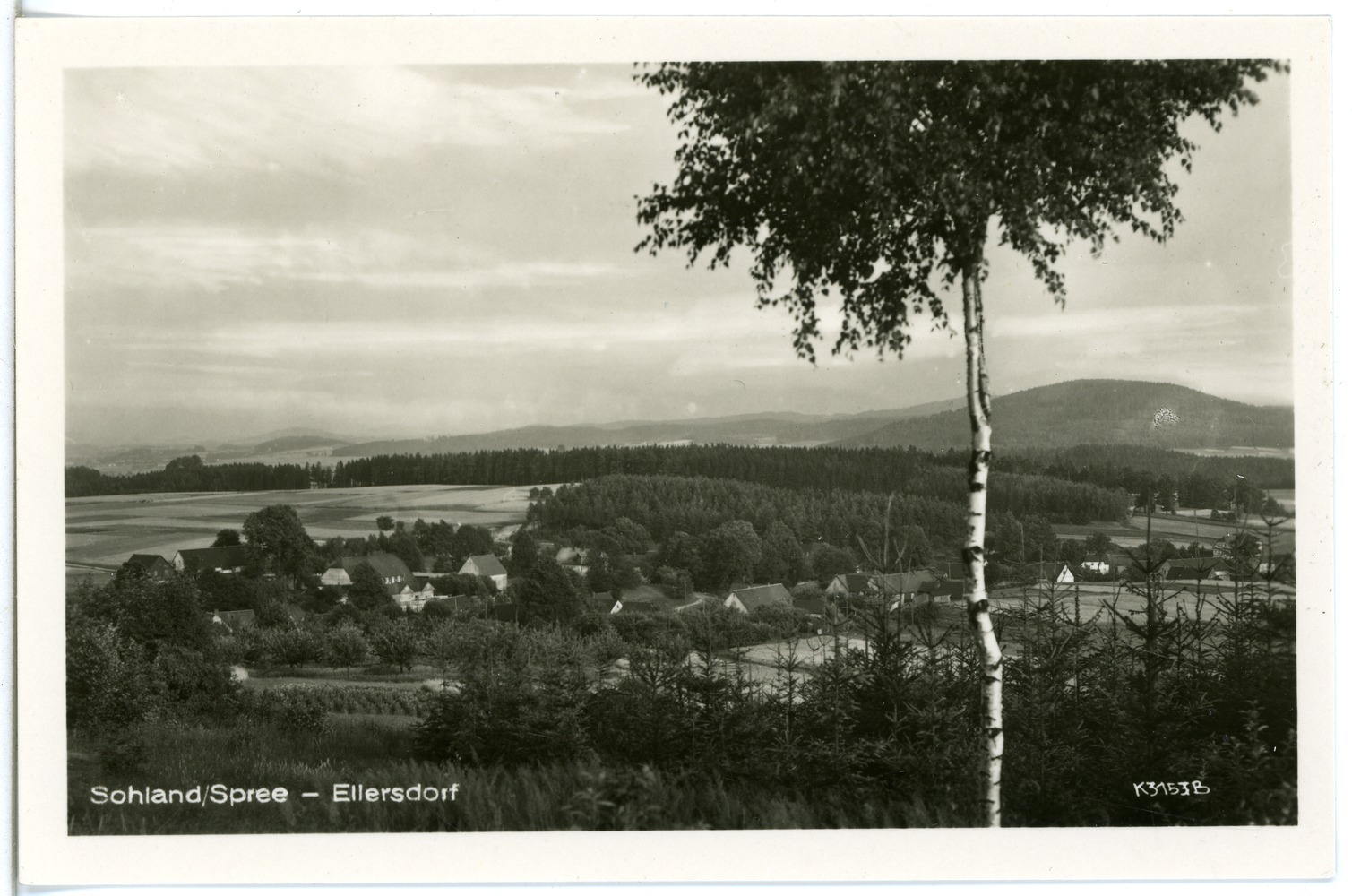 Sohland; Ellersdorf This postcard is from publisher Brück & Sohn in Meißen ( postcard has a unique number 28585 and is available in a higher resolution at the publisher. This images was uploaded in a cooperation project between Wikipedians and the publisher.